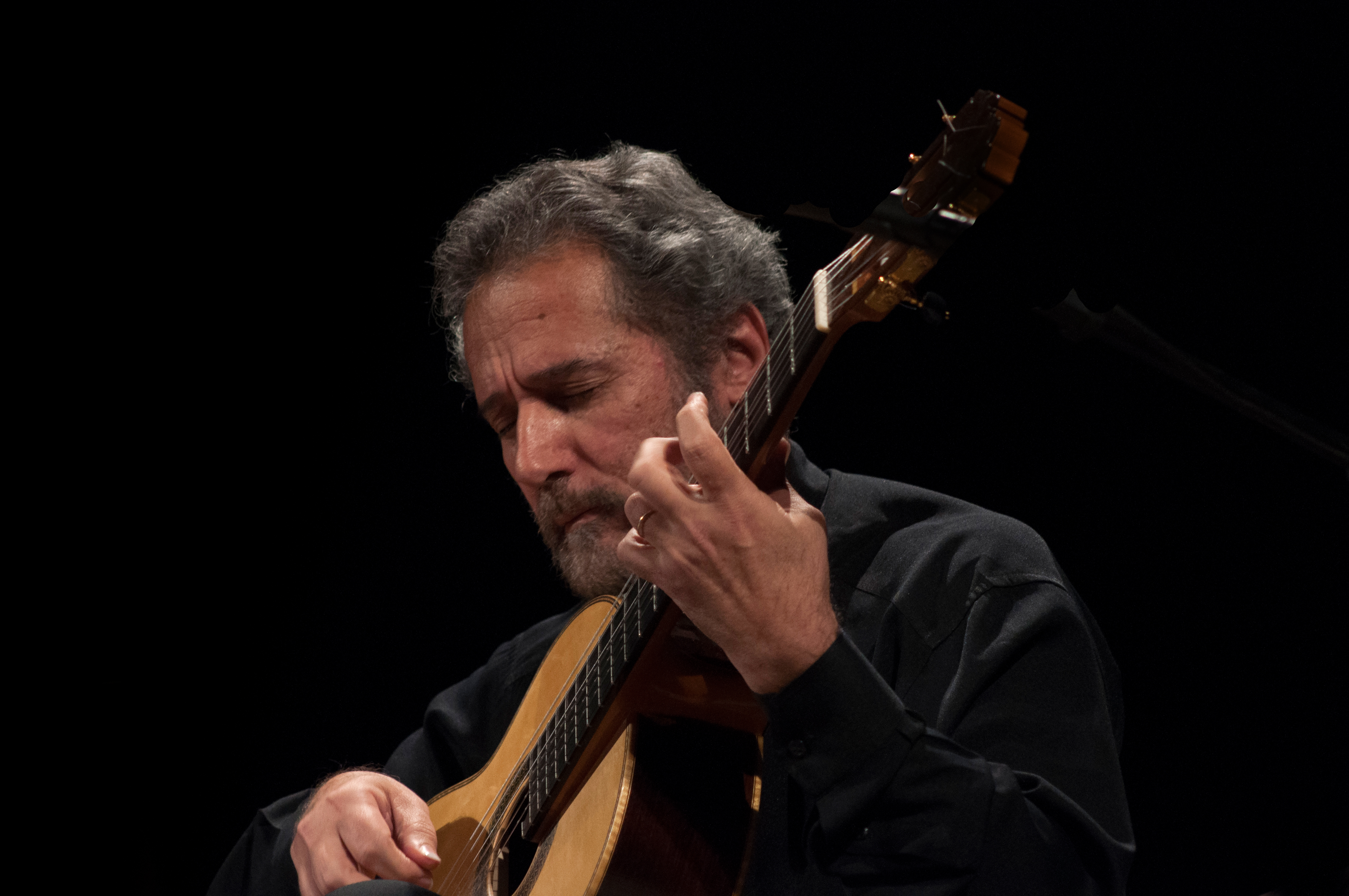 Sérgio Assad, durante concerto do Duo Assad no dia 30 de Julho de 2012, no Teatro Municipal de São João da Boa Vista, SP, Brasil.